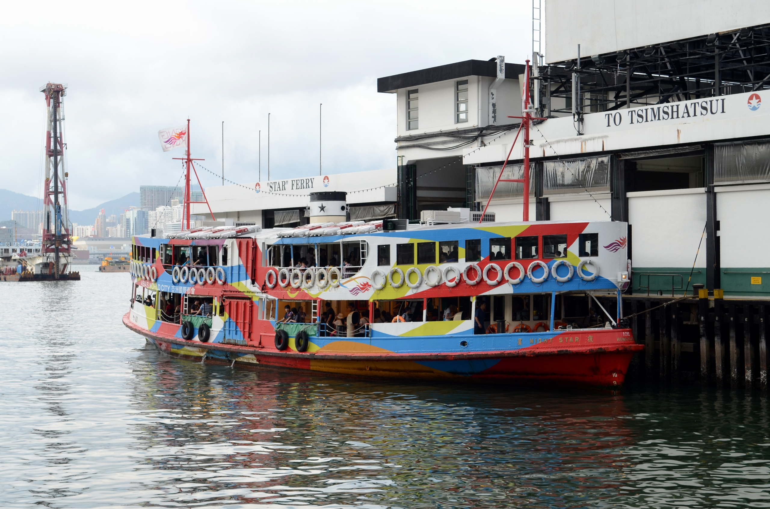 夜星（Night Star），亚洲国际都会主题涂装